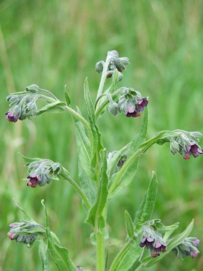 Ebnyelvűfű